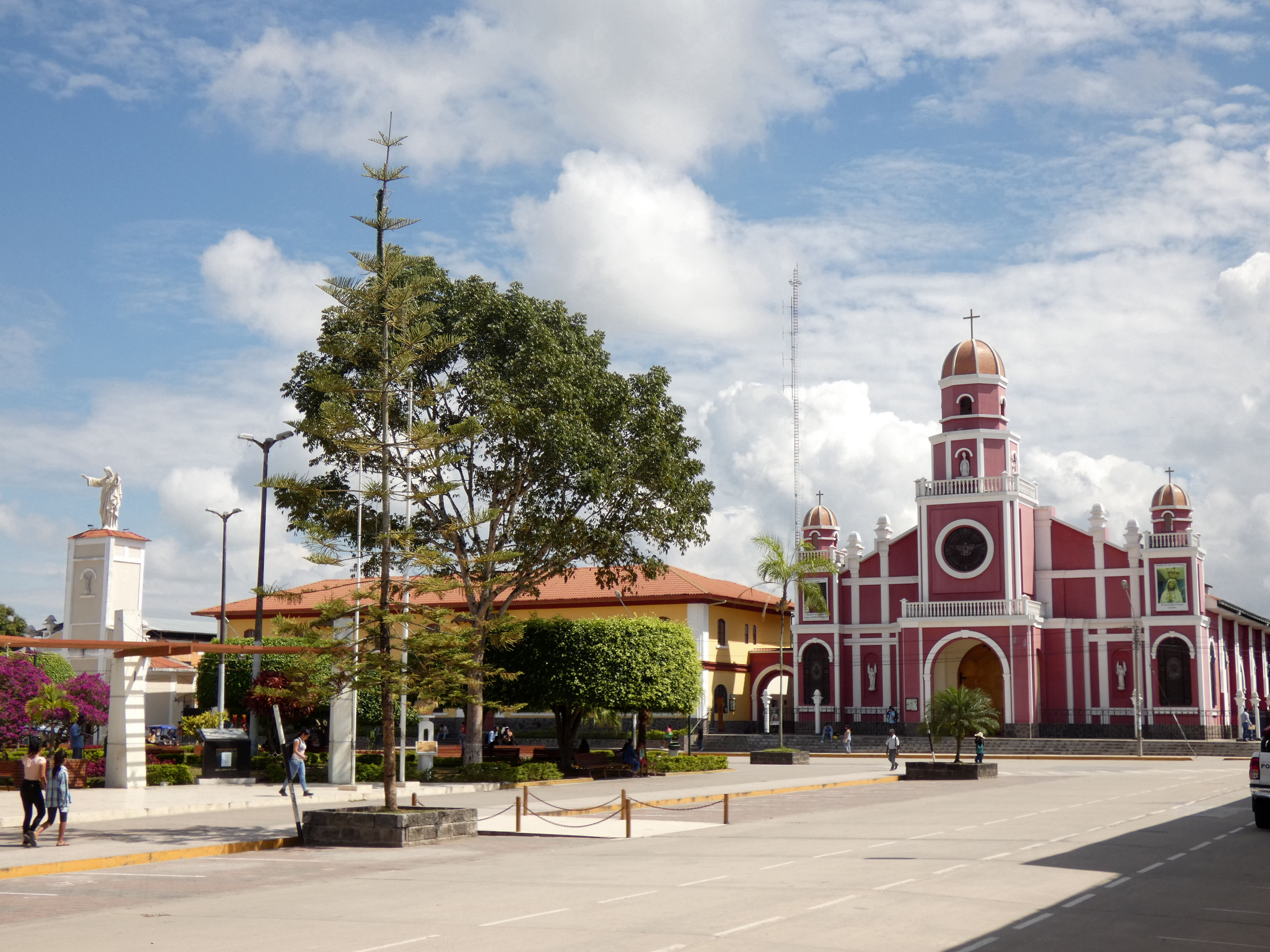 Plaza de Armas con la catedral, Moyobamba, Peru